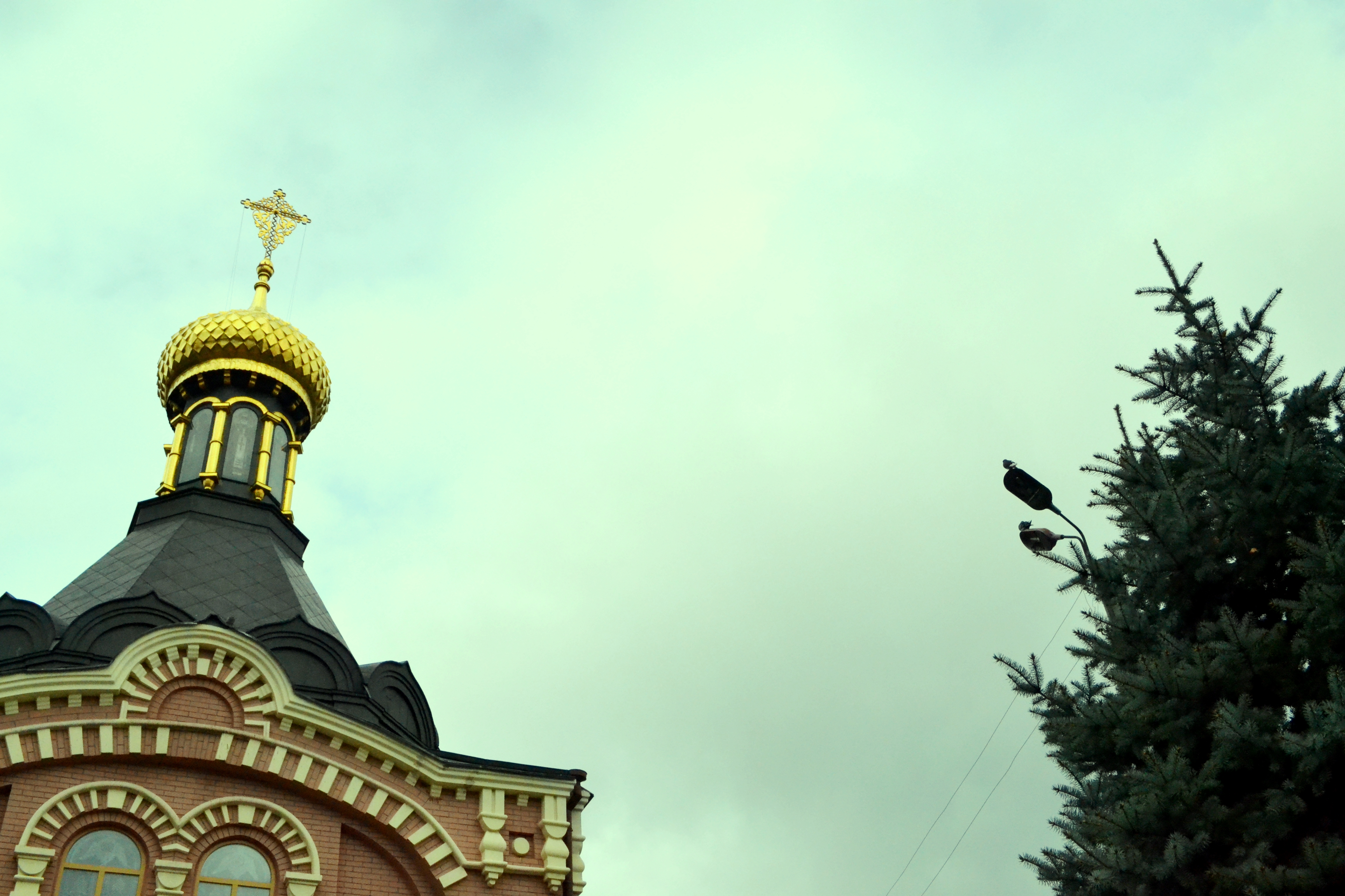 Купол